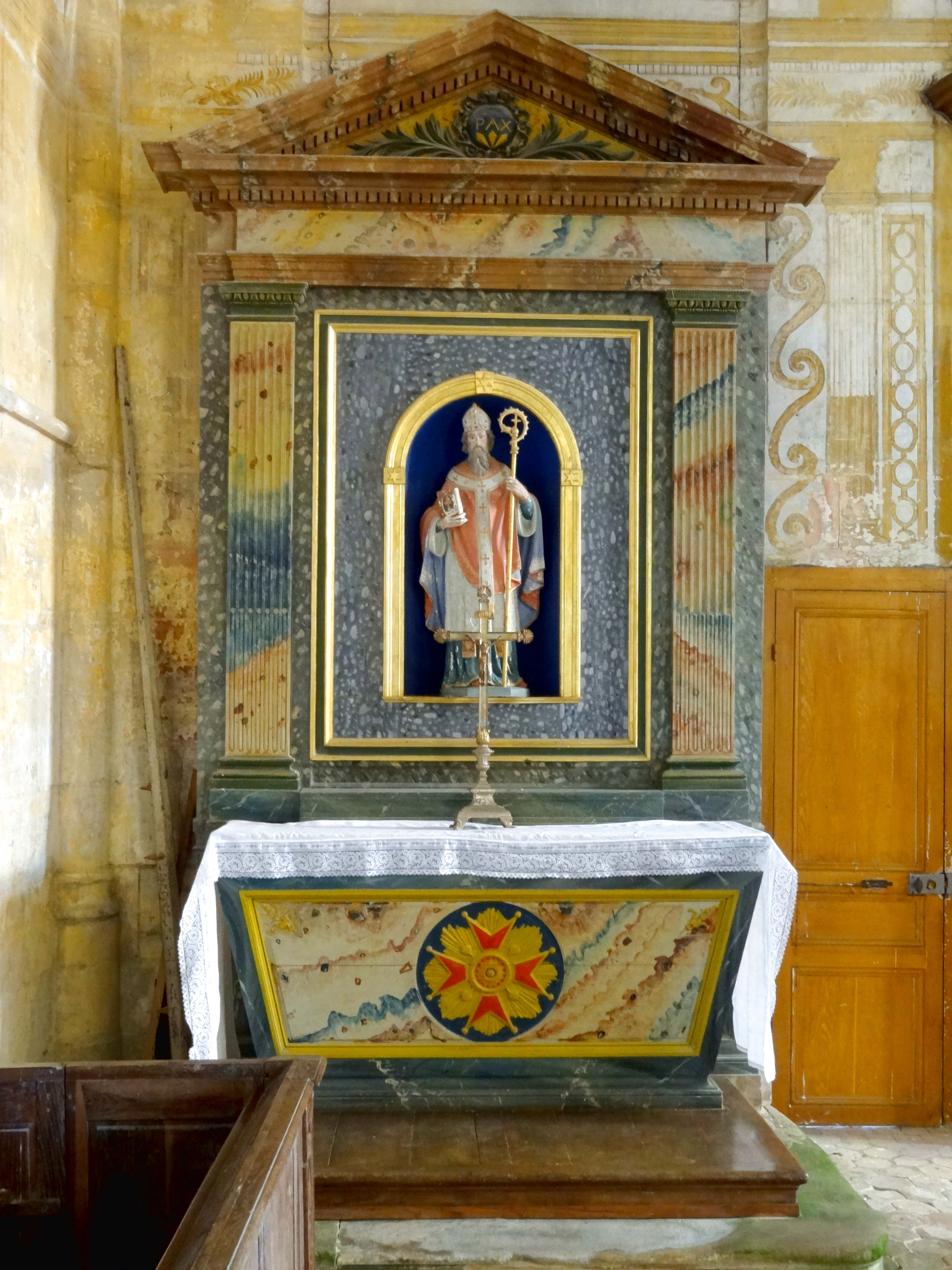 Mobilier de l'église - voir titre.